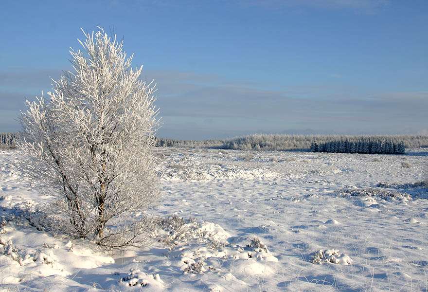 Hautes Fagnes en hiver.